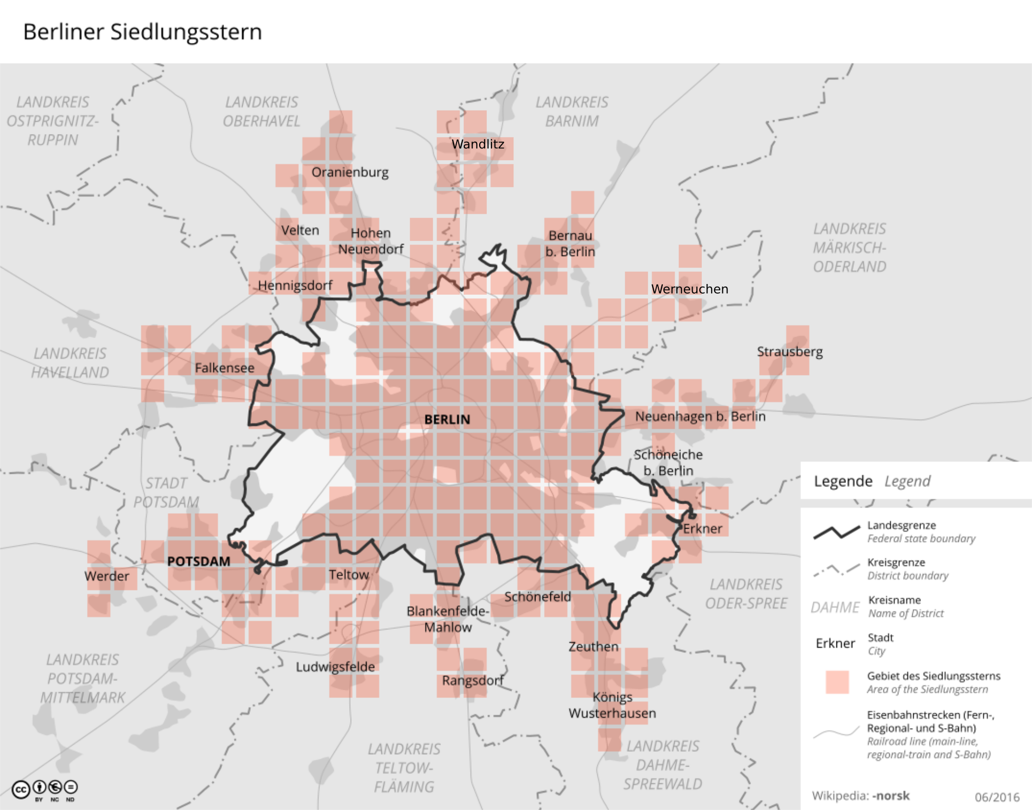 Übersichtskarte des Berliner Siedlungssterns